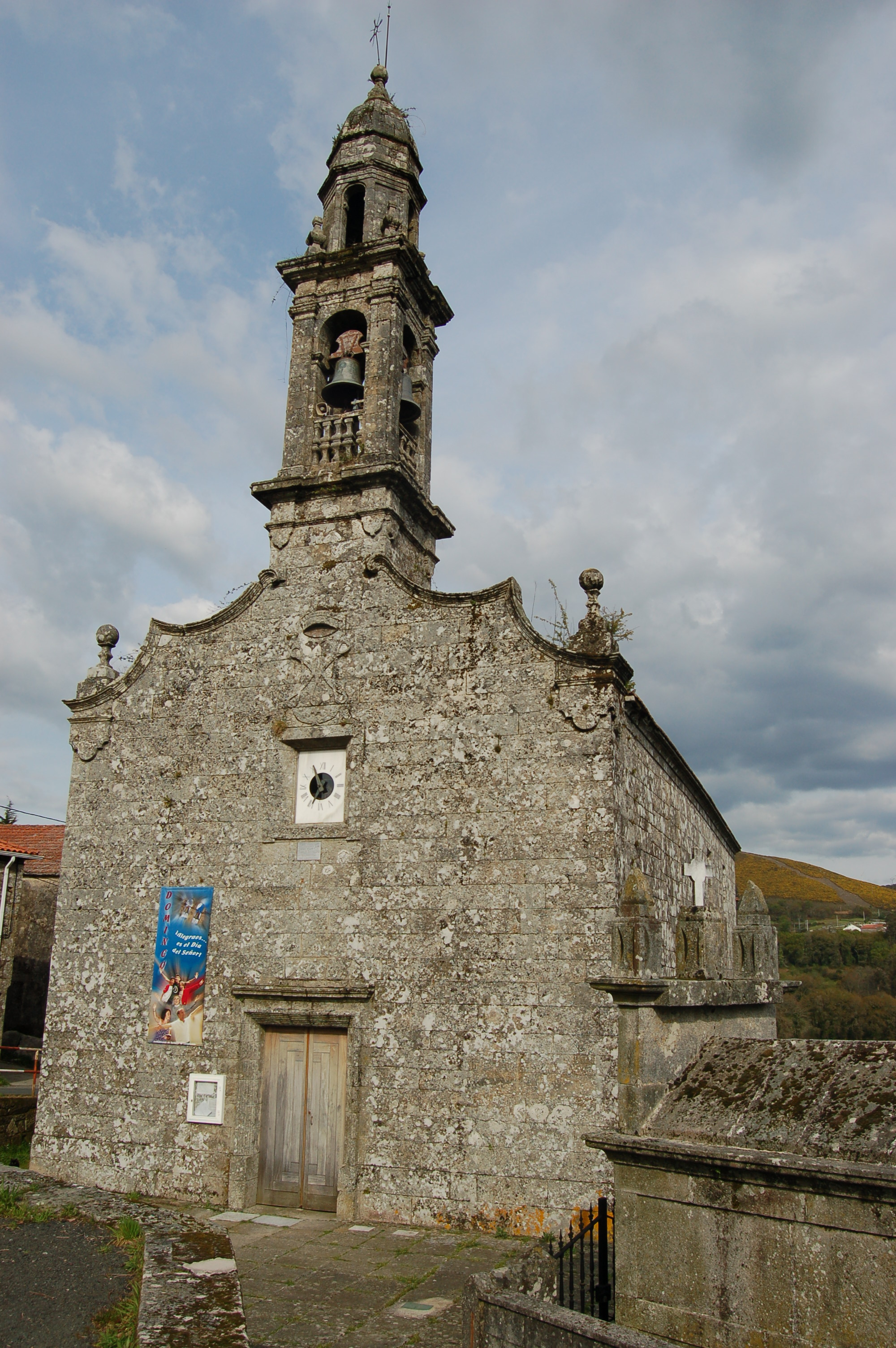 Igrexa parroquial de Santa María de Dúas Igrexas (Forcarei)